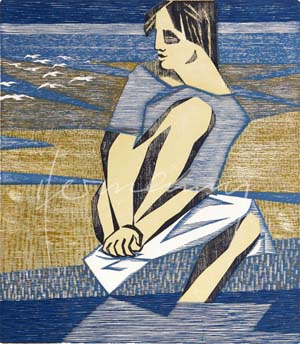 Gerhard Hermanns, Farbholzschnitt, Titel: September